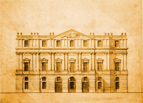 Milano - Il progetto di Giuseppe Piermarini per il teatro alla Scala (1779). Milan - Giuseppe Piermarini's original project or the teatro alla Scala (1779)